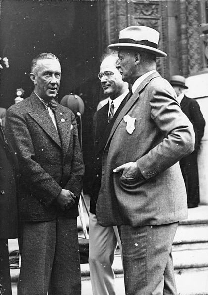 Factual corrections and alternative descriptions are encouraged separately from the original description. Additionally errors can be reported at this page to inform the Bundesarchiv. Original historic description: Berlin, Olympia-Vorbereitung Scherl Die amerikanischen Olympiakämpfer in Berlin eingetroffen Staatskommissar Dr. Lippert, Dr. Lewald und mitte der Leiter der Amerikaner, Brundage. (Photo Hoffmann) 24.Juli 1936 [Vor dem Roten Rathaus in Berlin] Abgebildete Personen: vlnr Lippert, Julius Dr.: Staatskommissar und Oberbürgermeister von Berlin, NSDAP, Journalist, Deutschland Brundage, Avery: Präsident des Internationalen Olympischen Komitees (IOC), USA (GND 118516078) Lewald, Theodor Dr.: Organisationskomitee der Olympischen Spiele, IOC, Staatssekretär, Deutschland Julius Lippert, Avery Brundage and Berlin Games organizer Theodor Lewald confer, Berlin, 1936.